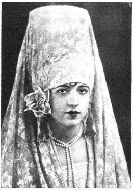 «La Asturiana», transformista imitador de cupletistas tanto en el Paralelo como en La Criolla, en el Barrio Chino, en Barcelona. Publicada en Mundo Gráfico en 1933 [1][2]